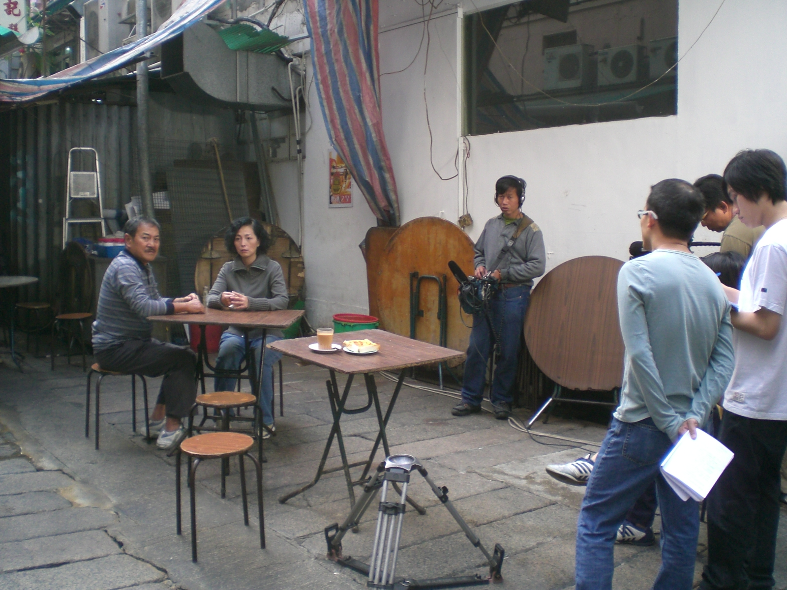 Dai pai dong 大牌檔, 上環美輪街近歌賦街及九如坊